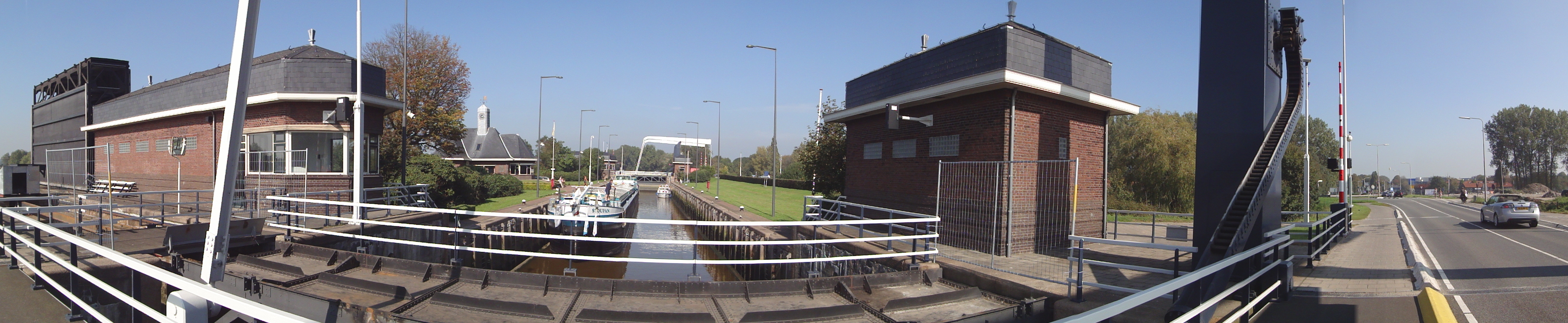 Julianasluis